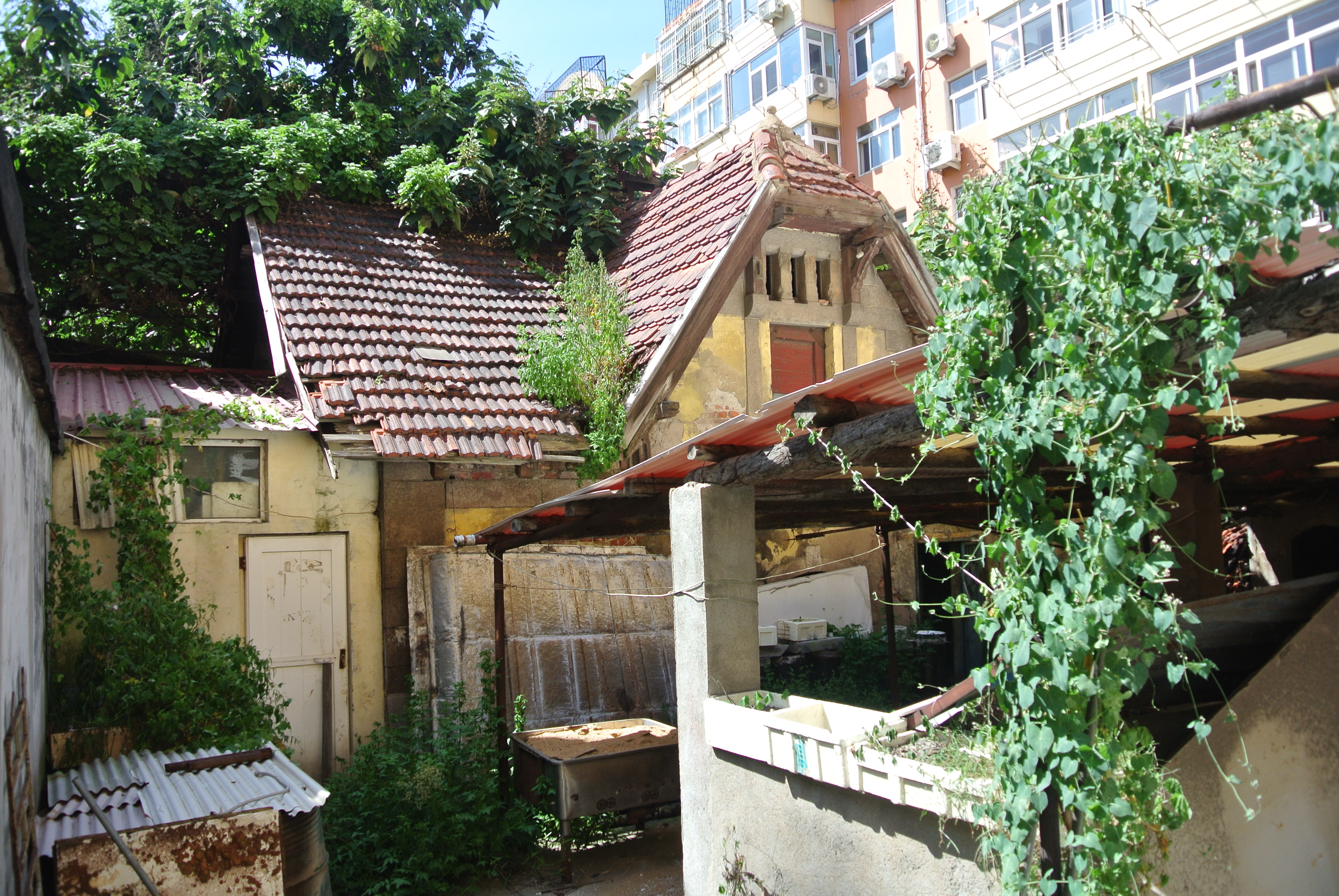 青岛总督府屠宰场旧址残留附属建筑